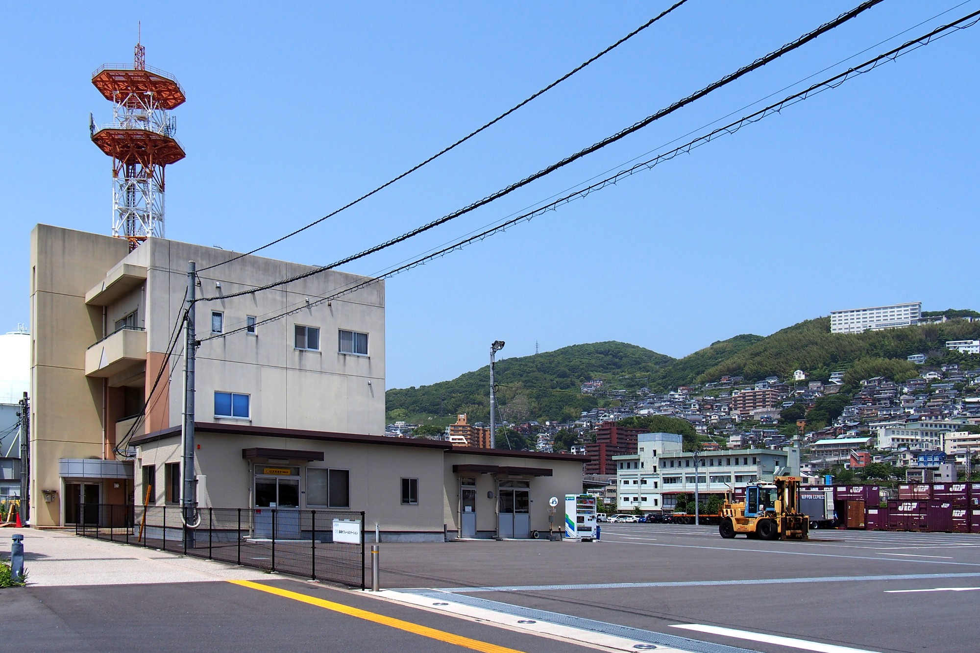 JR長崎駅に隣接する長崎オフレールステーション